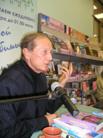 Фотография сатирика Михаила Задорнова